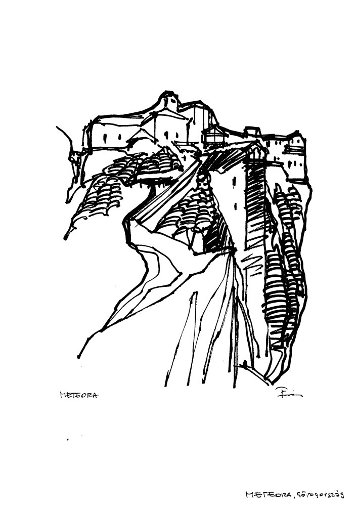 Meteorák, Görögország (útirajz)